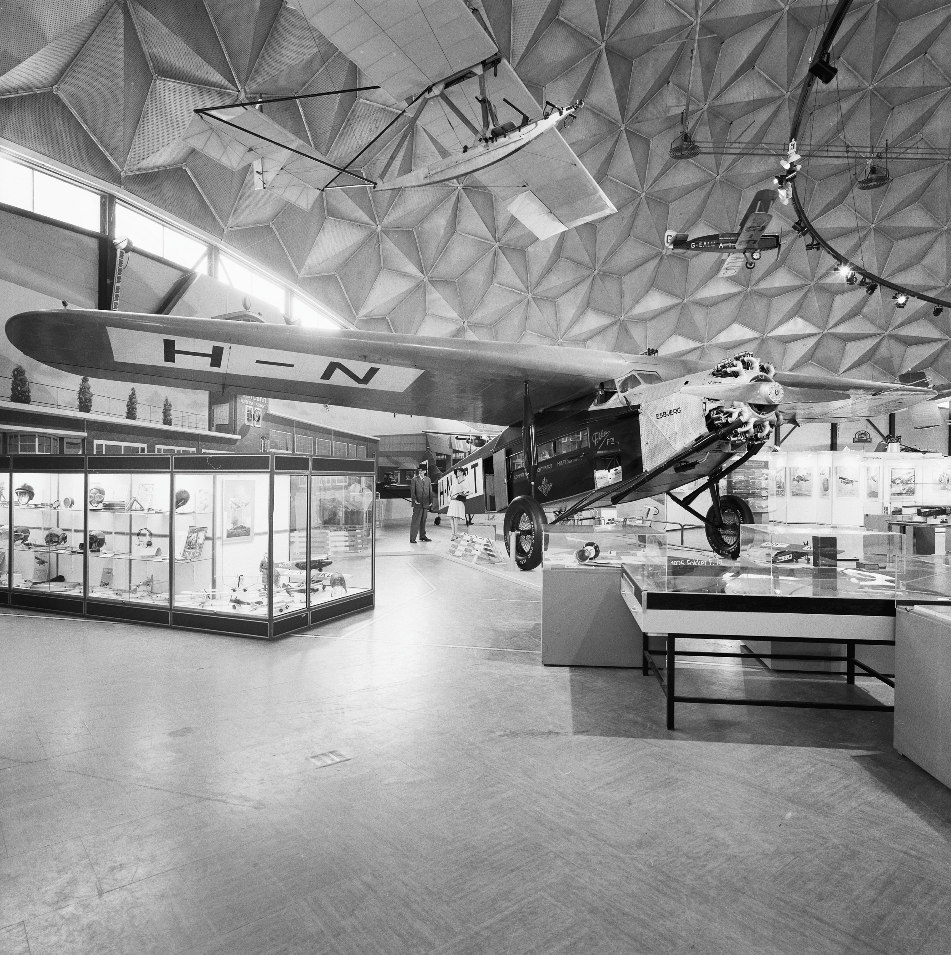 AVIODOME: INT. OVERZICHT VLIEGTUIGEN